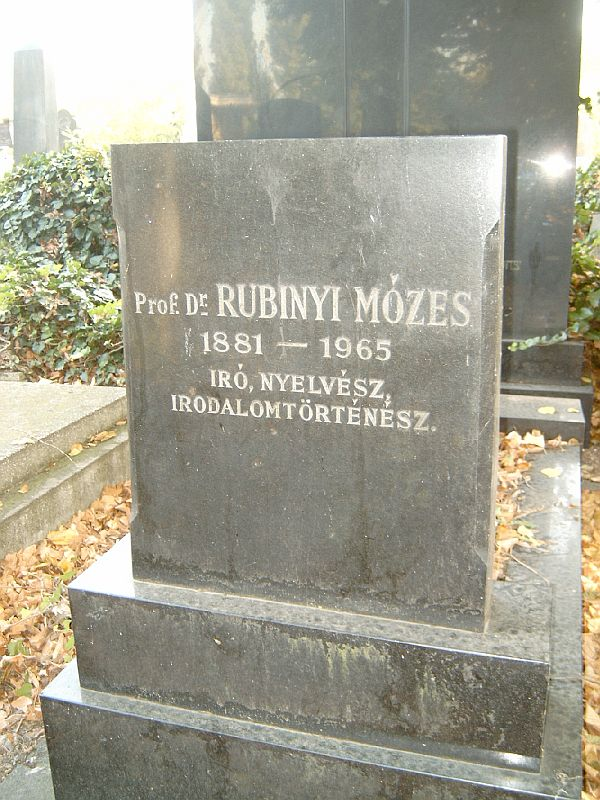 Rubinyi Mózes (Debrecen, 1881. ápr. 1. – Bp., 1965. szept. 26.) nyelvész, irodalomtörténész, az MTA tagja sírja Budapesten. Kozma utcai izraelita temető: 5B-9-2.